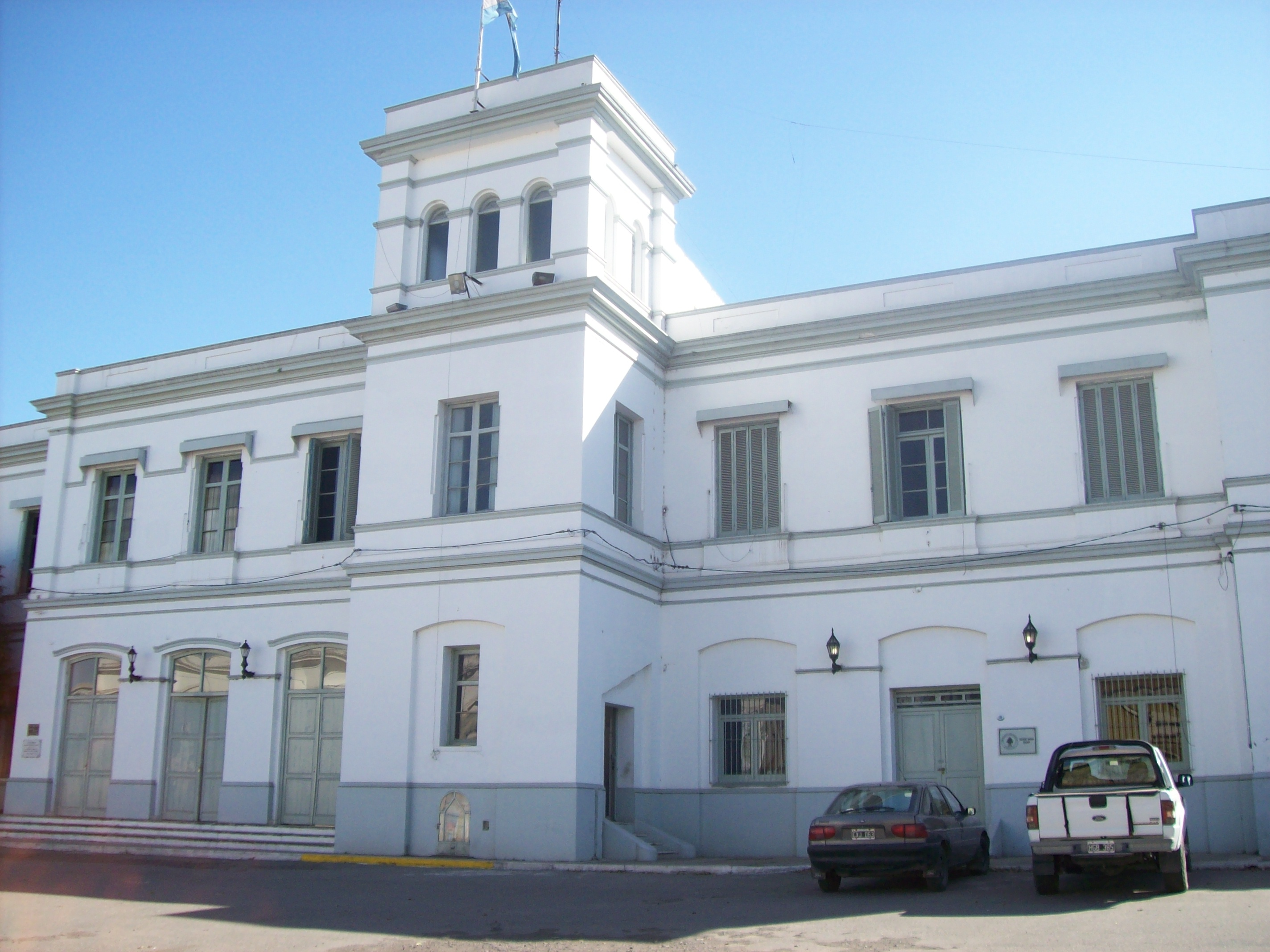 Fachada del edificio de la estación Central Córdoba (FCGB) de San Miguel de Tucumán, Argentina.